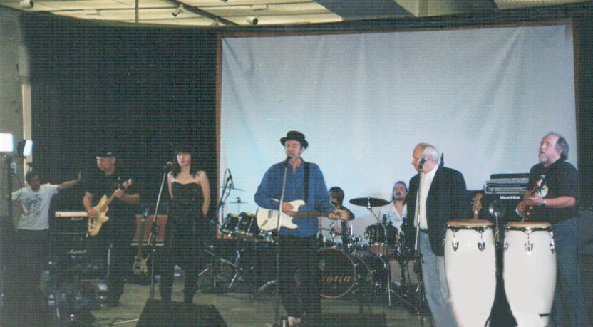 Выступление группы "Санкт-Петербург" в "Манеже" на концерте, посвящённом 40-летию.